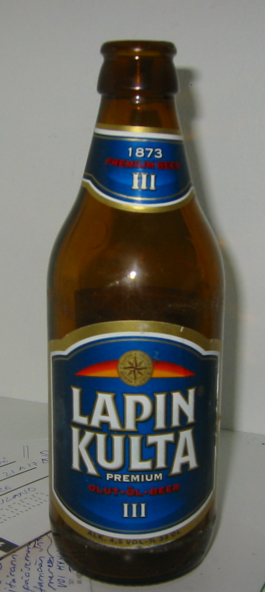 Lapin Kulta III beer